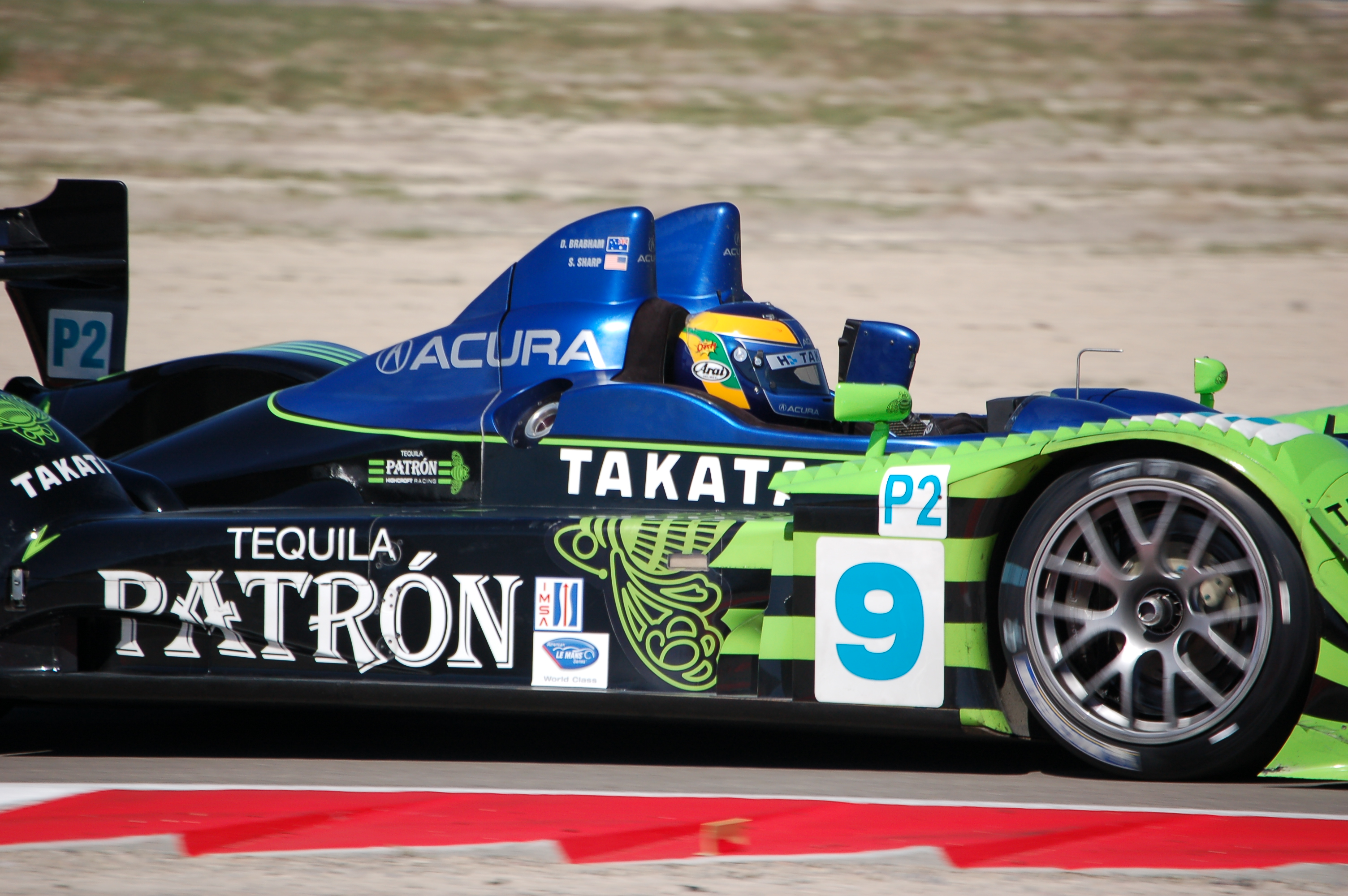 Acura!